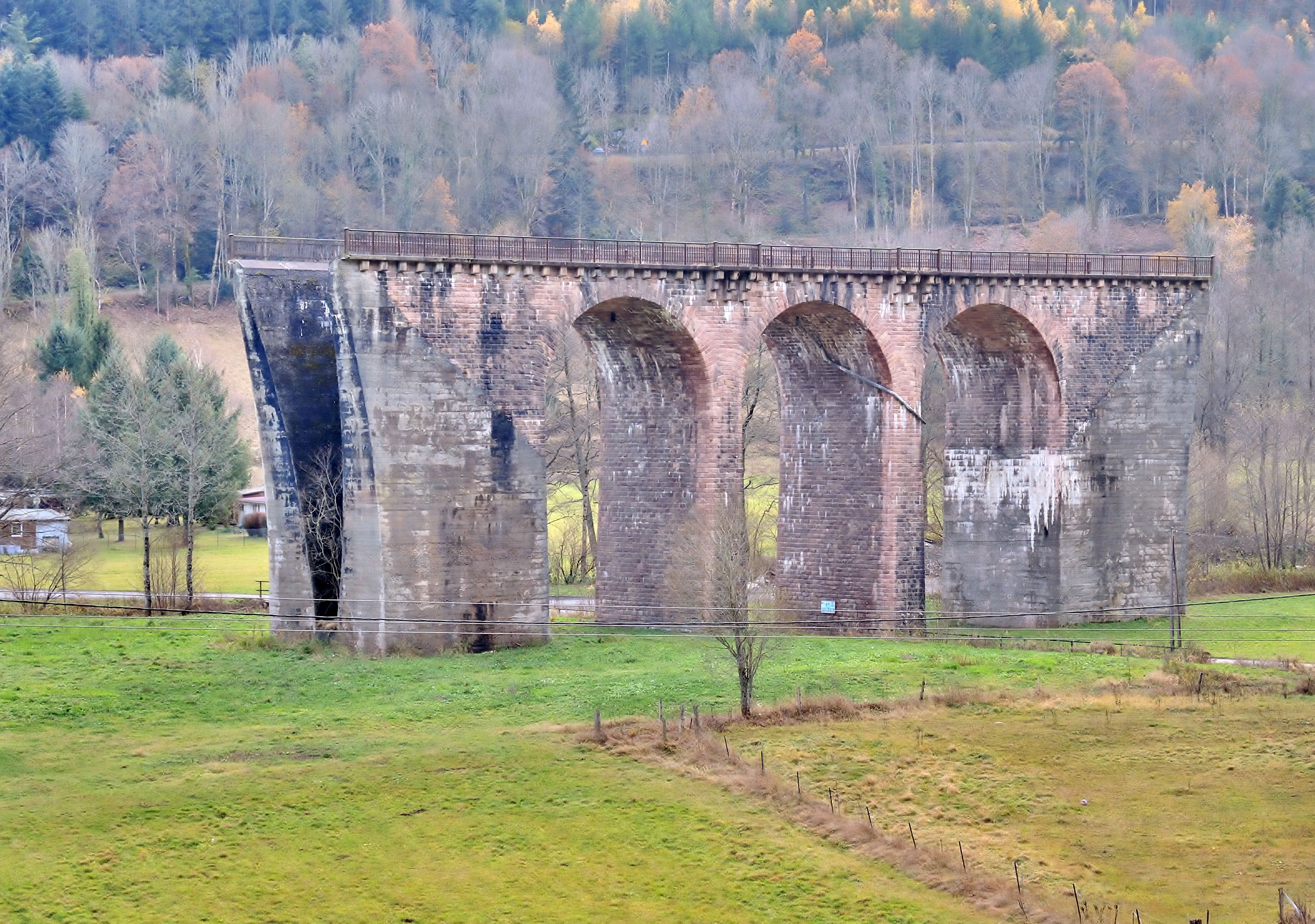 Autre vue du pont de la ligne ferroviaire inachevée d'Urbès